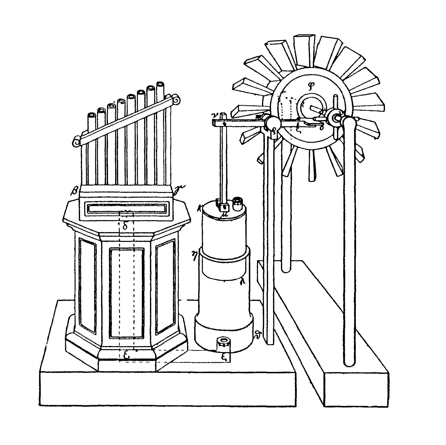 Ursprungsbild bearbeitet